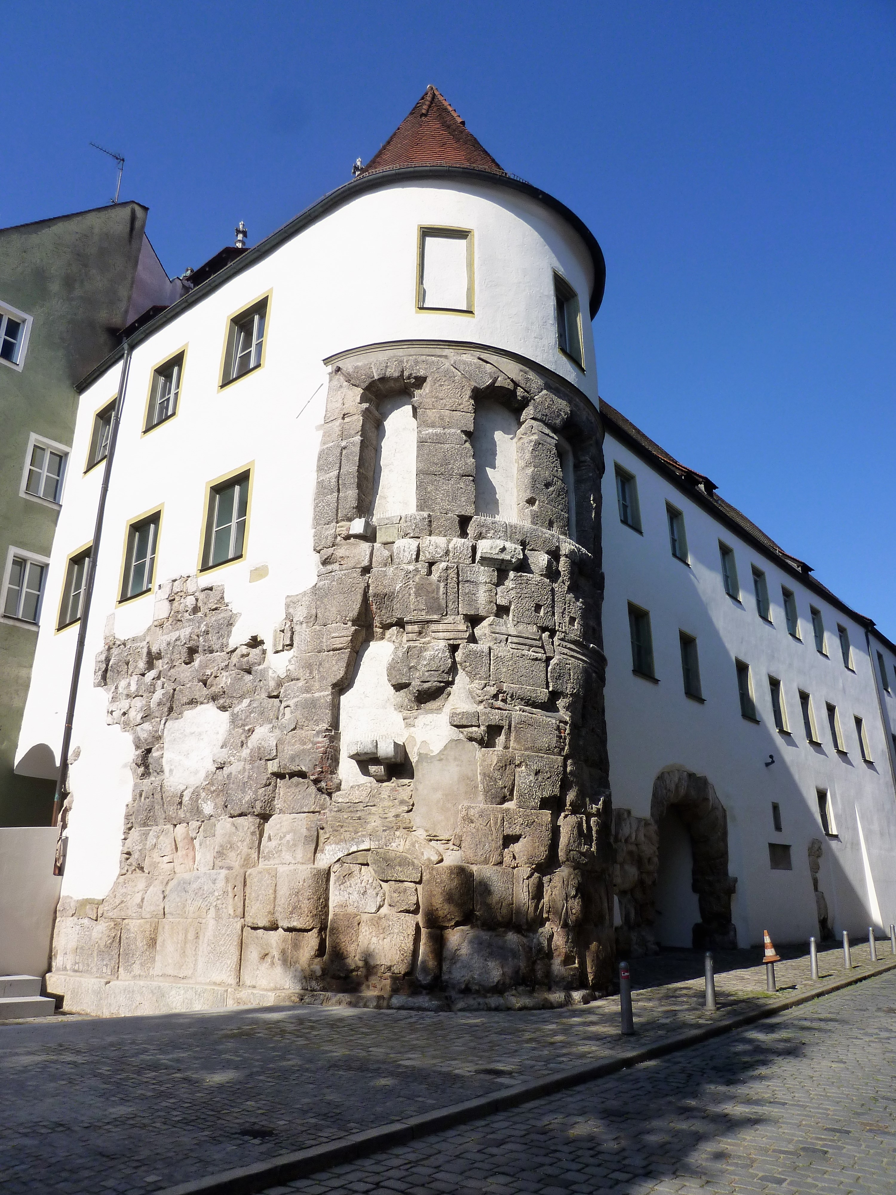 Blick auf die Alte Stadtmauer "Porta Praetoria" in Regensburg. Diese Mauer begrenzte das römische Lager nach Norden hin.This is a photograph of an architectural monument.